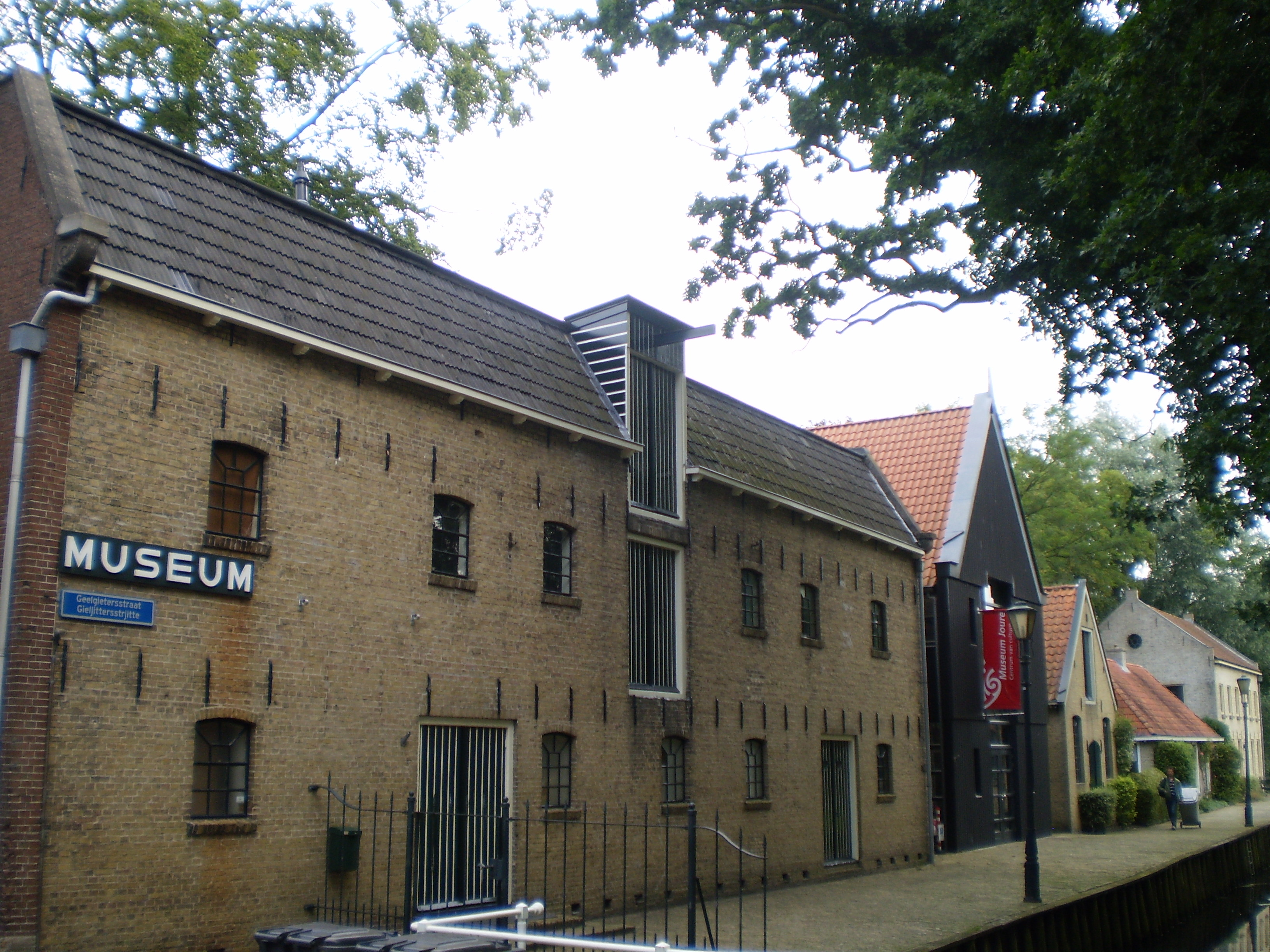 Ofbyld oanbean troch Swarte Kees op 30 july 2009